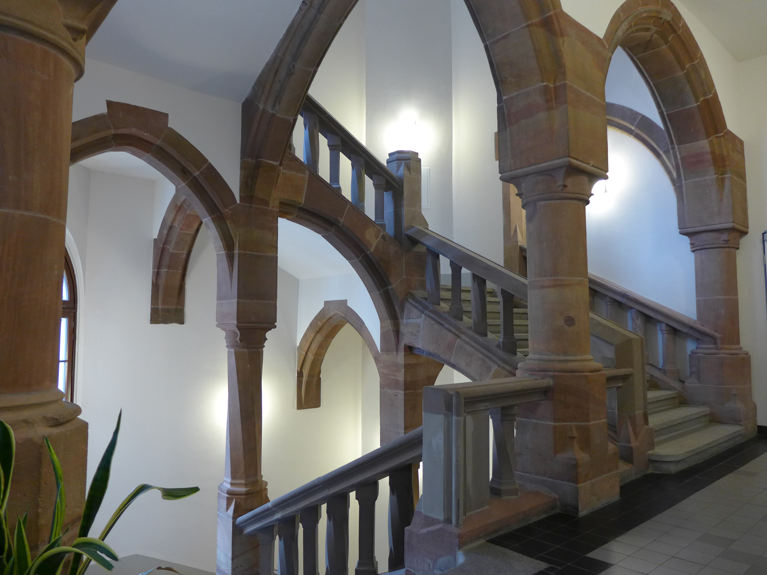 Rathaus St. Johann, Nebentreppenhaus des Hauberrisserbaues